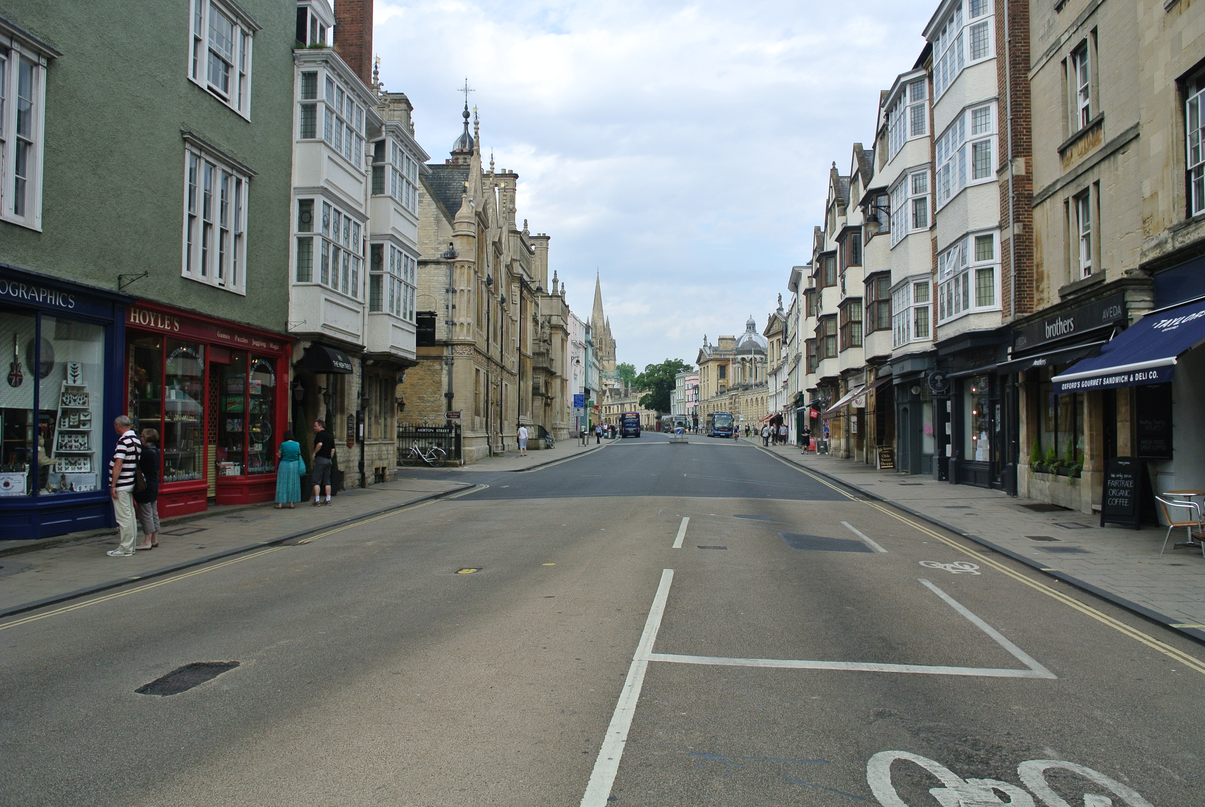 オックスフォードの街並みの風景